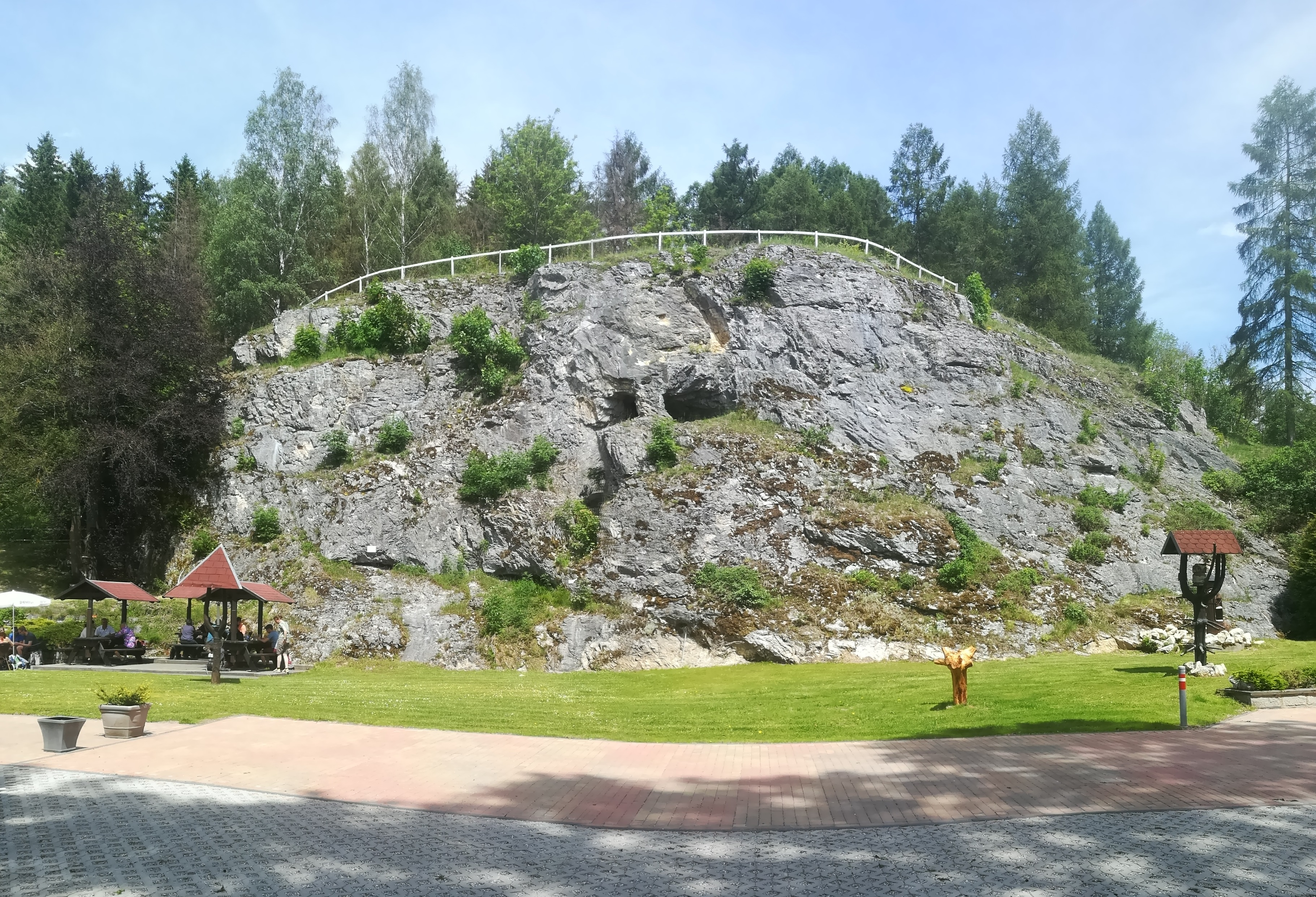 Die Ackertklippe, eine Kalksteinklippe in Königshütte im Harz